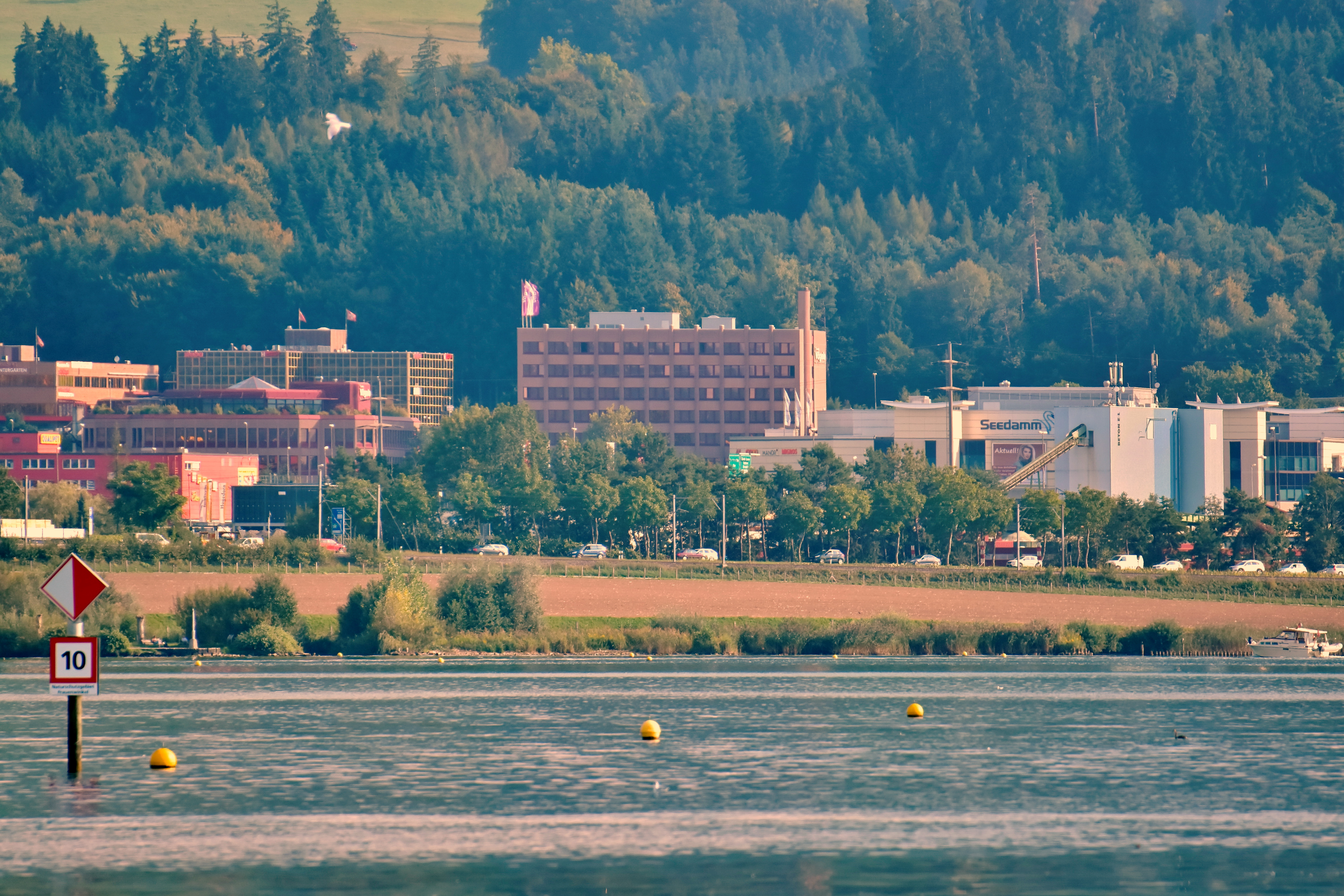 Seedamm-Center, Frauenwinkel protected area and Seedamm causeway as seen from Zürichsee-Schifffahrtsgesellschaft (ZSG) ship MS Helvetia on Zürichsee in Switzerland